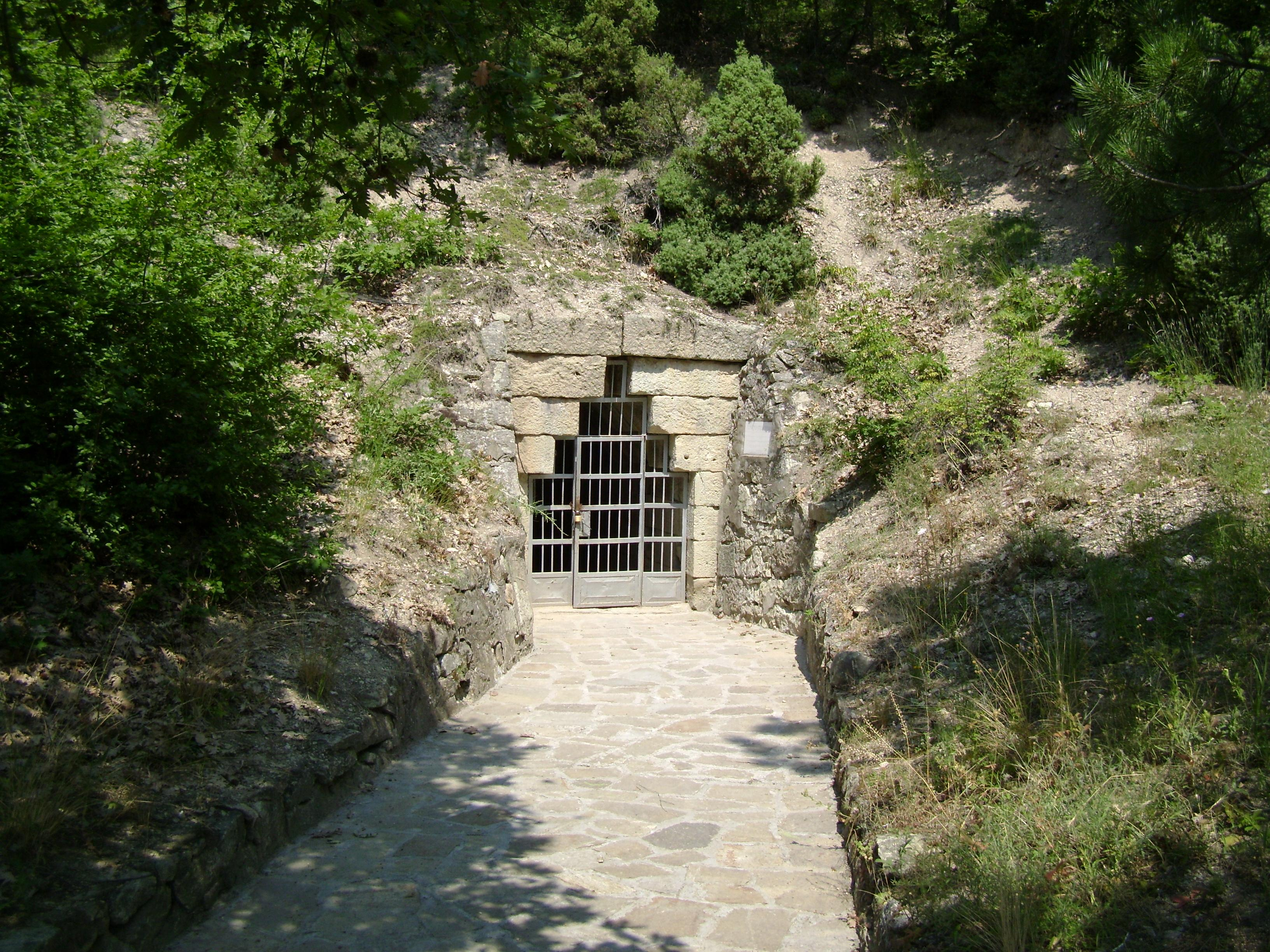 Входът на тракийската гробница